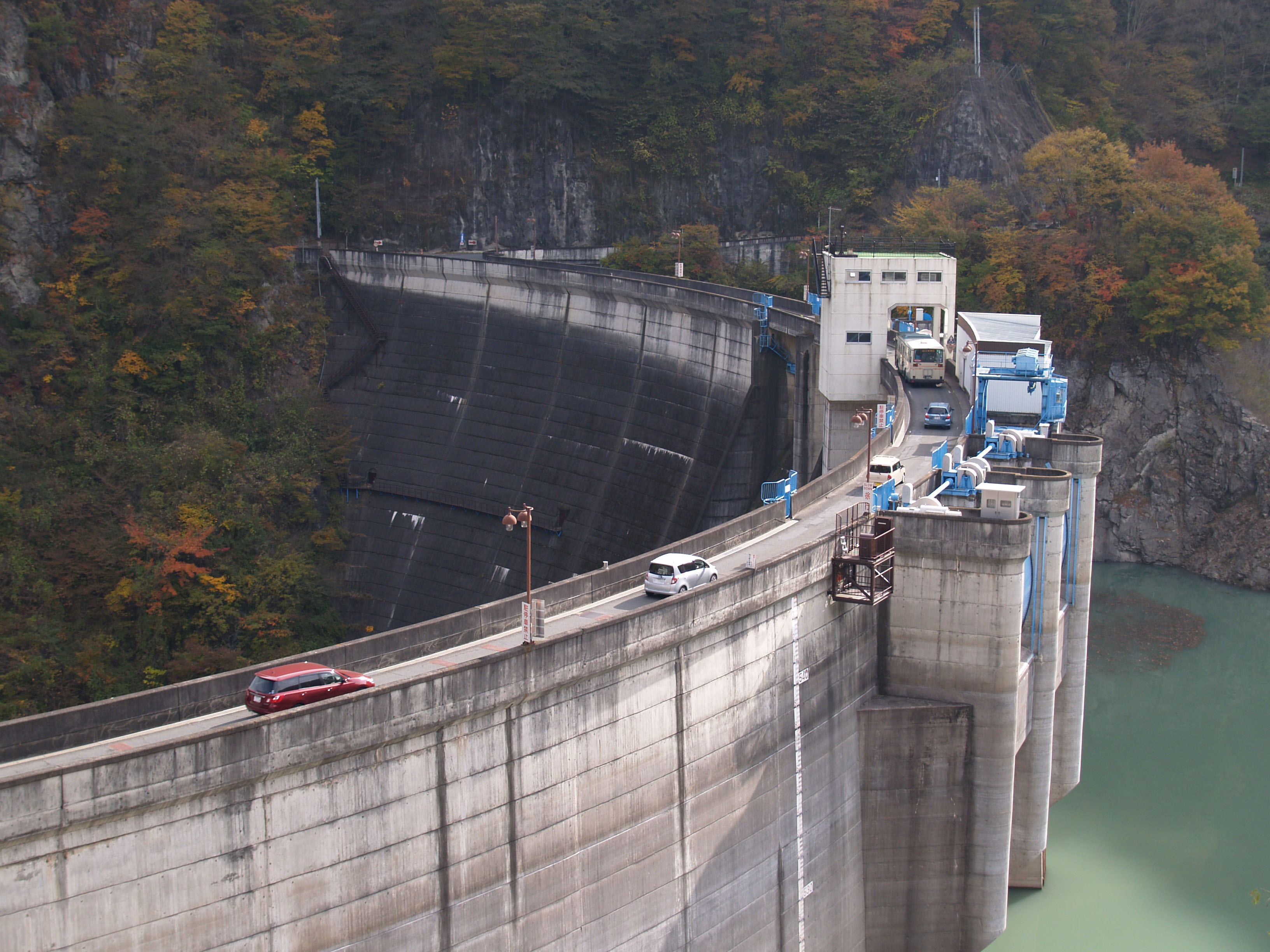 二瀬ダム。その天端を埼玉県道278号秩父多摩甲斐国立公園三峰線が通る。県道は天端上では信号機による交互一方通行となっている。